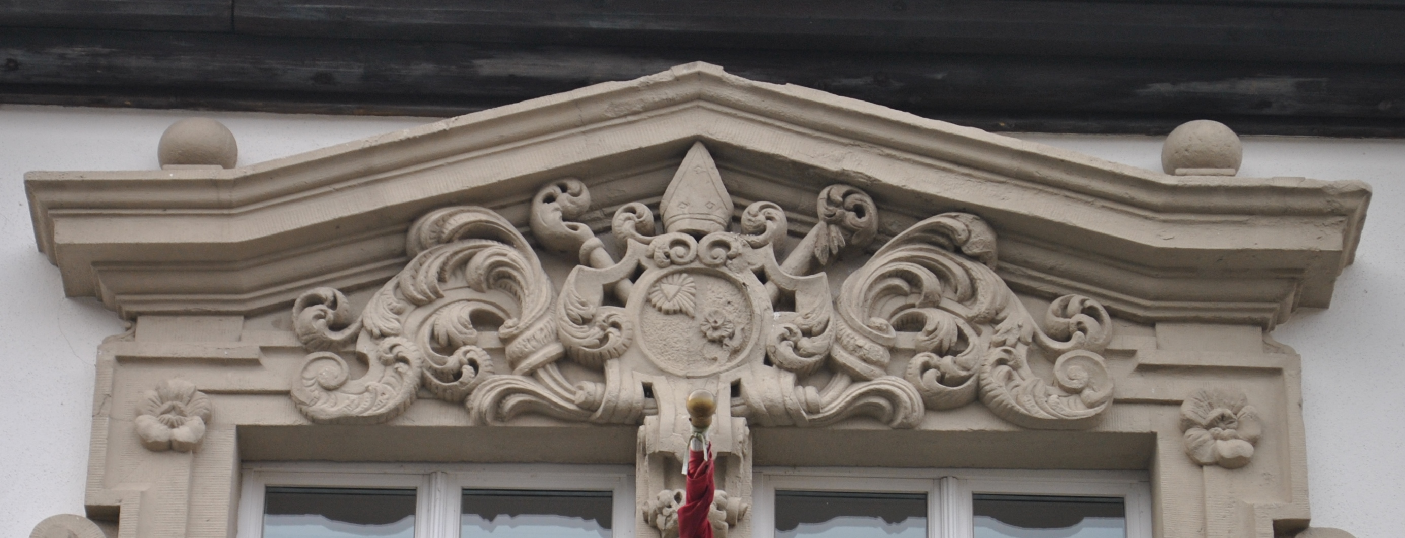 Wappen des Abtes Wilhelm Söllner, Kloster Ebrach, Ebrach Marktplatz